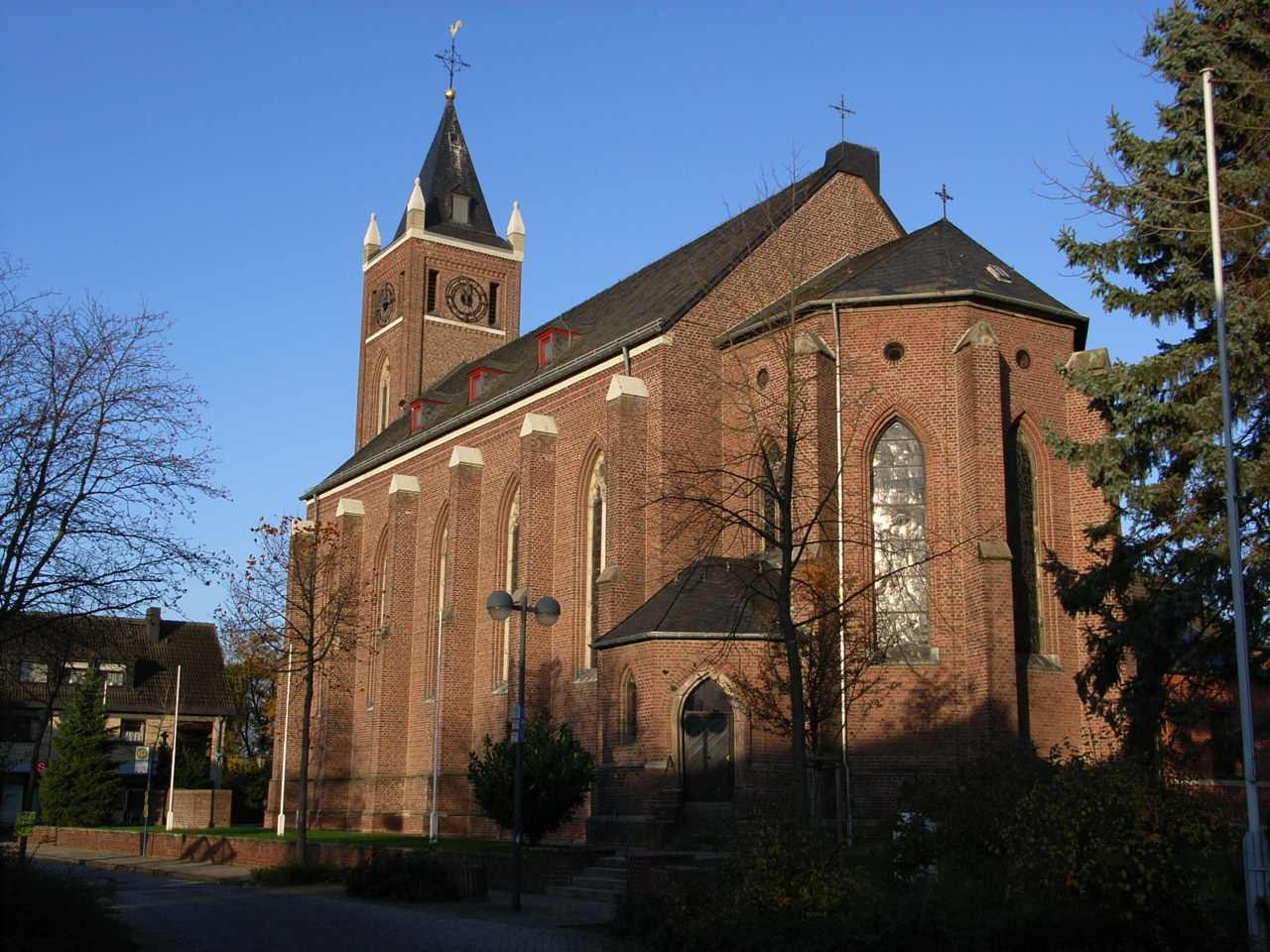 Beggendorf Kirche St. Pankratius